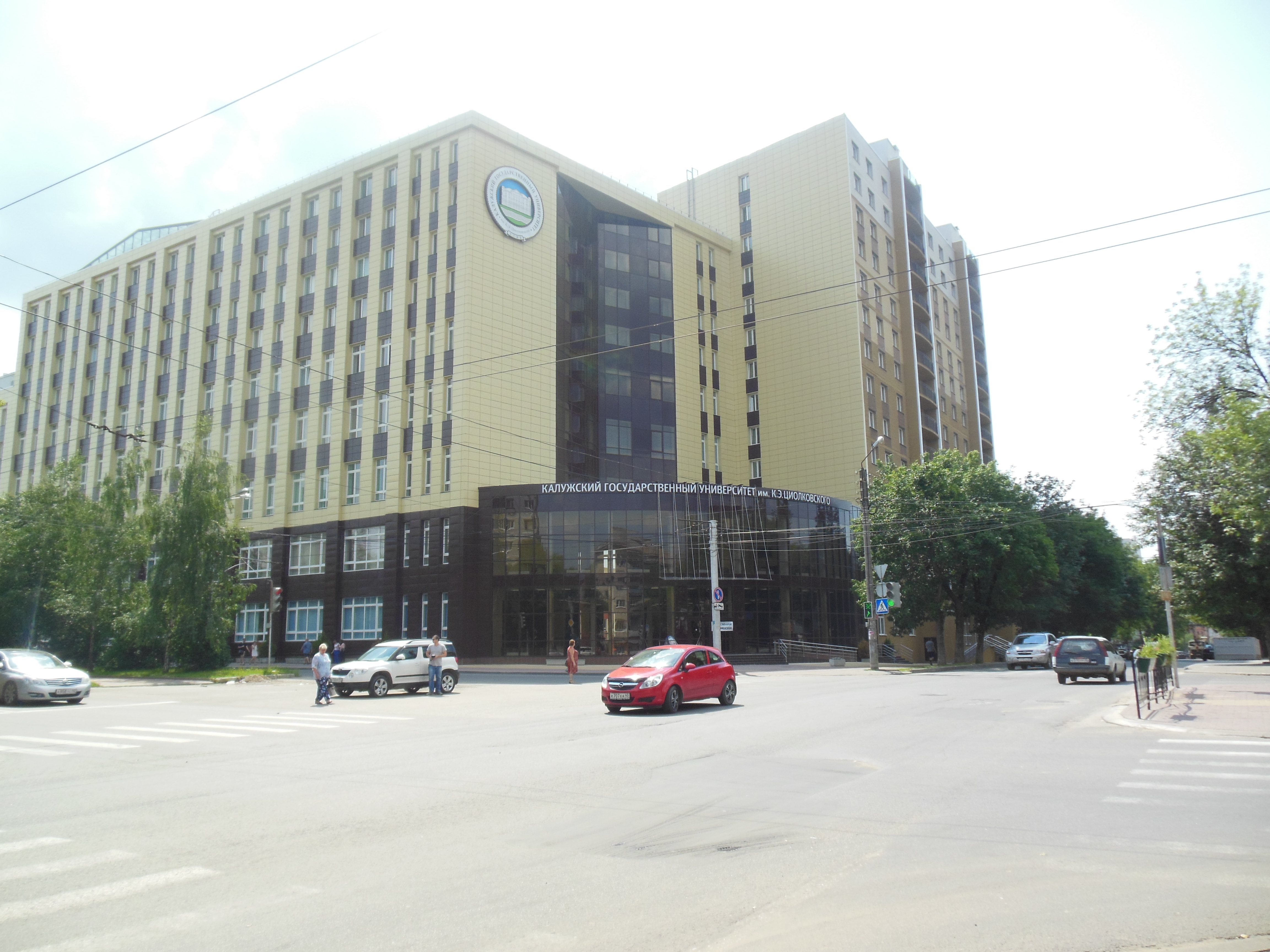 КГУ им. К. Э. Циолковского. Корпус по адресу:улица Степана Разина, д. 26, построено в 2008 году. В корпусе проводятся занятия для студентов института естествознания, института психологии и физико-технологического института.